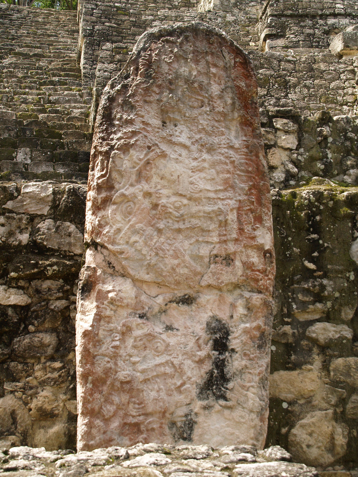 Stele 43 on Base of Structure II, Site of Calakmul, Mexico. Estela 43 en la base de la Estructura 2, en la zona arqueológica de Calakmul, México.